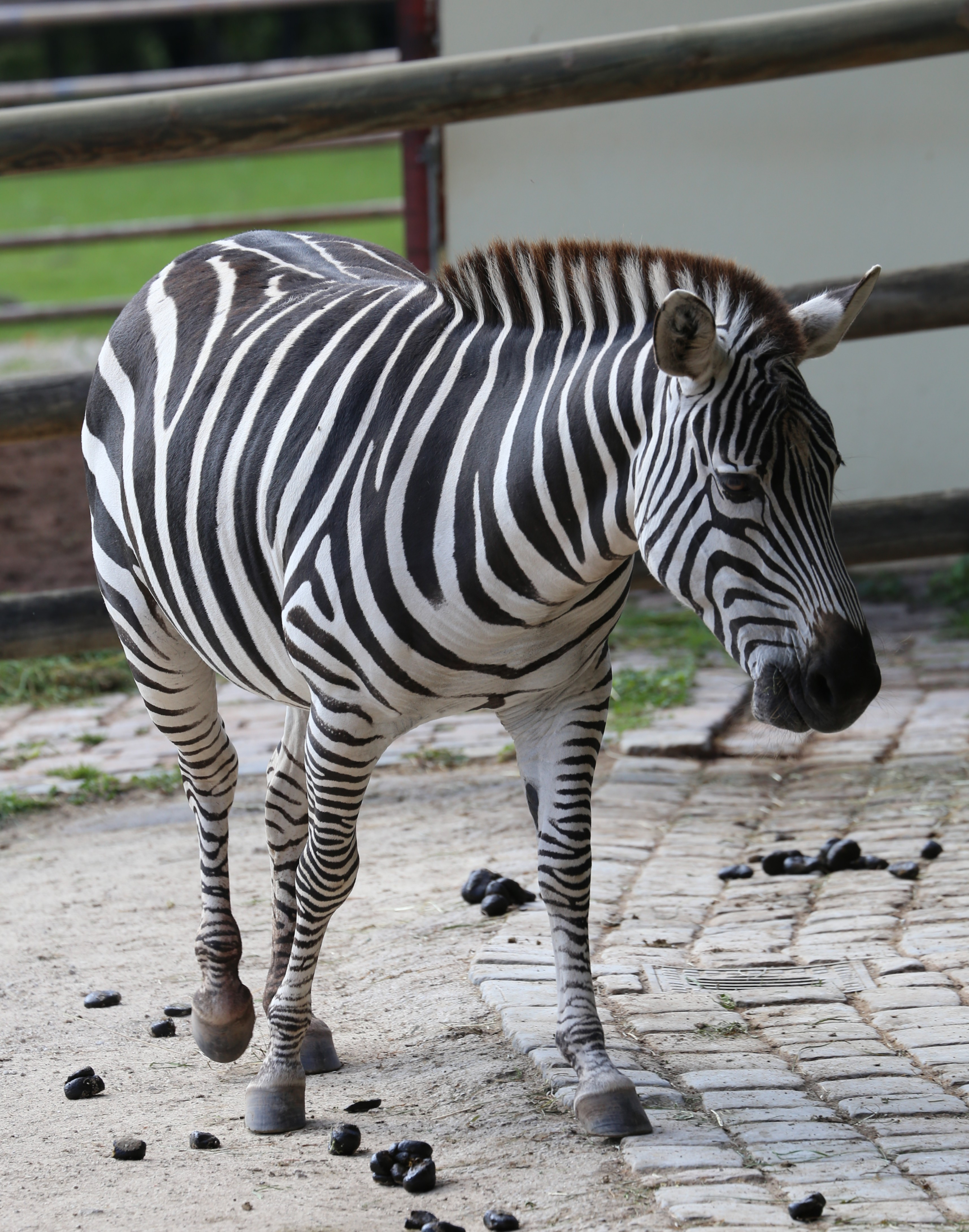 Böhmzebra (Equus quagga boehmi), Tiergarten Nürnberg